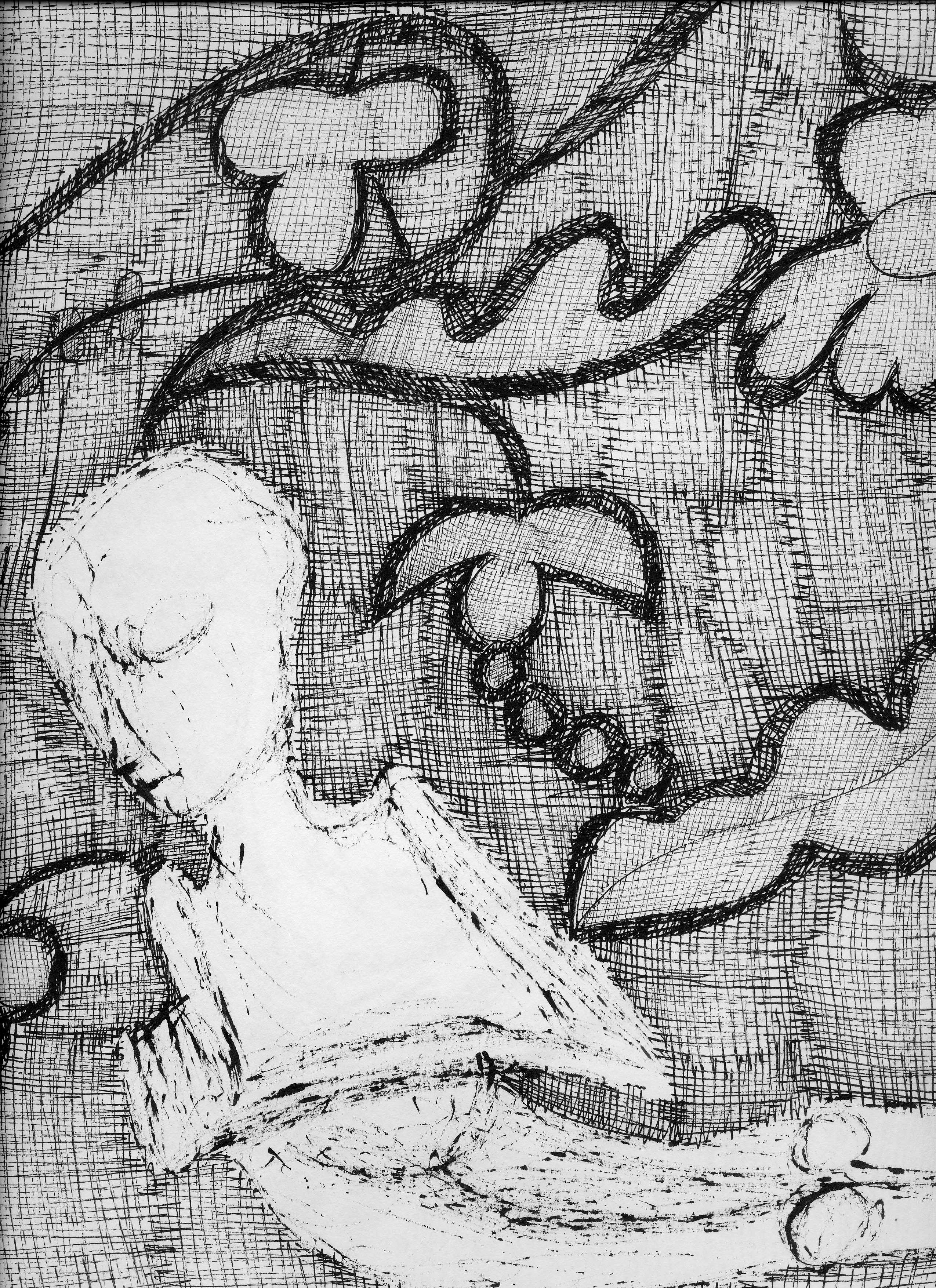 Photo of Drawing 48, Book 193 by Rosemarie Koczy